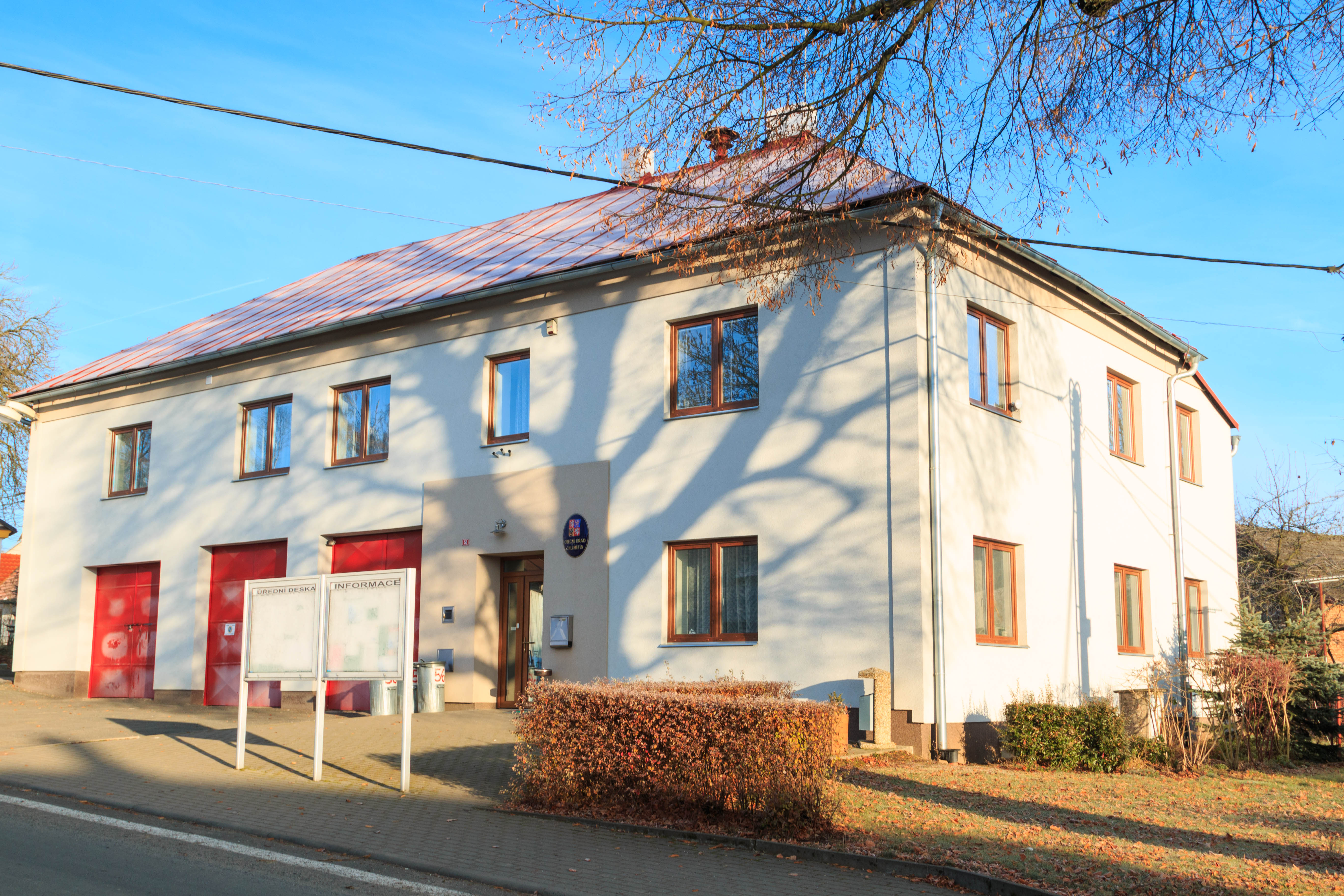 Chlumětín - obecní úřad